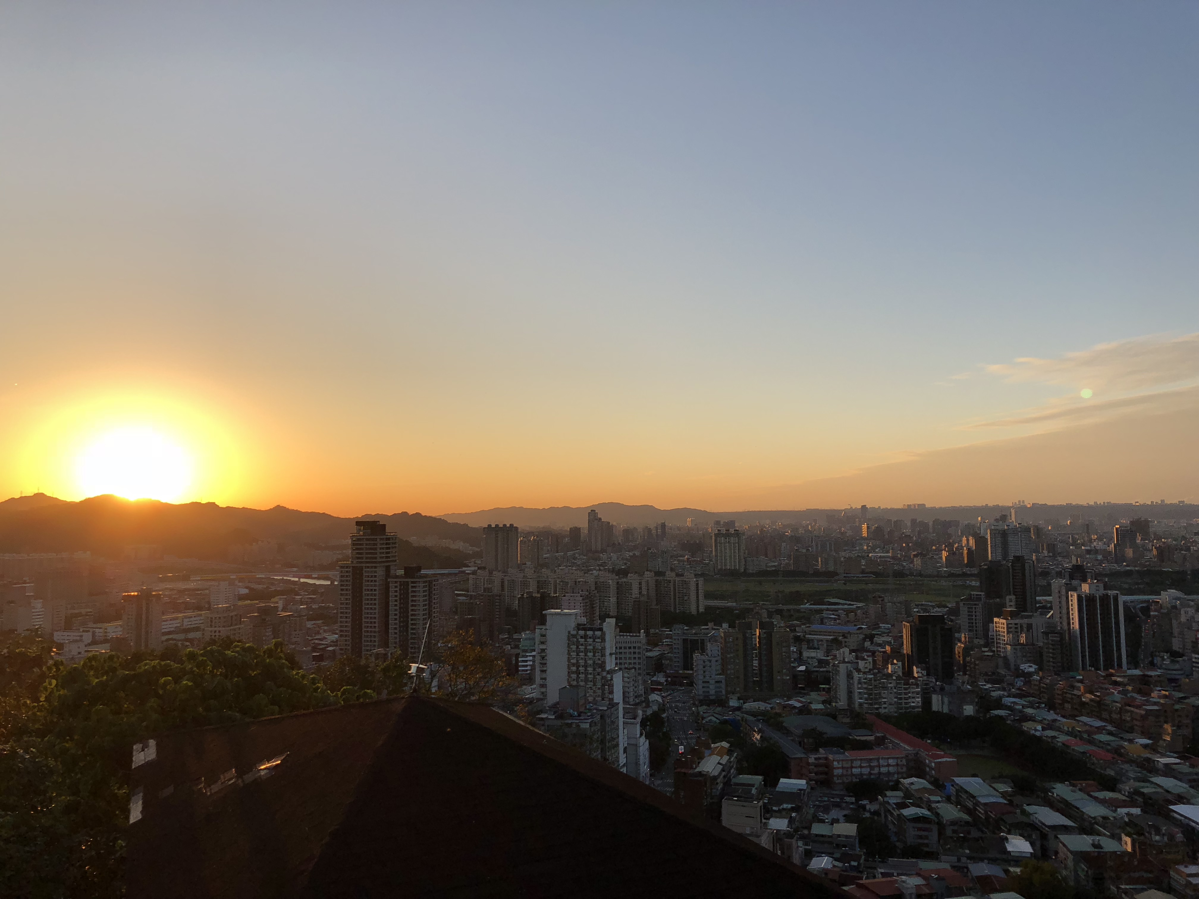 中文（台灣）: 仙跡岩登山步道俯瞰台北市美景